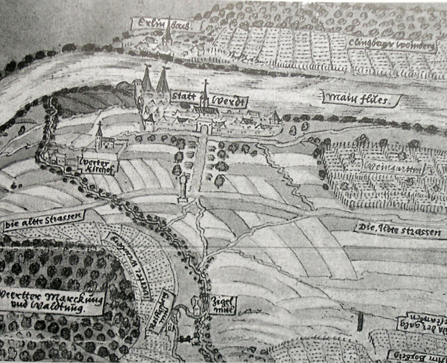 Karte der Herrschaft Breuberg aus dem Jahre 1615, Ansicht von Wörth am Main, Anschauungsmaterial für Verhandlungen vor dem Reichskammergericht.